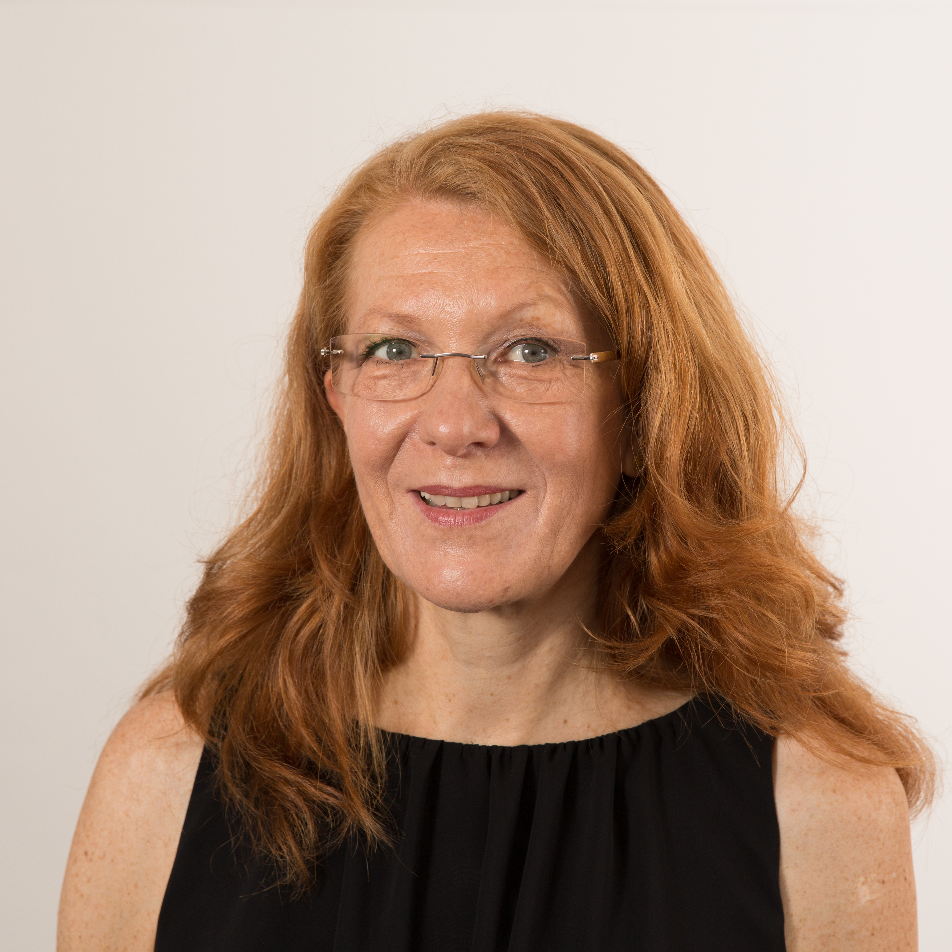 Die saarländische Landtagsabgeordnete Petra Berg